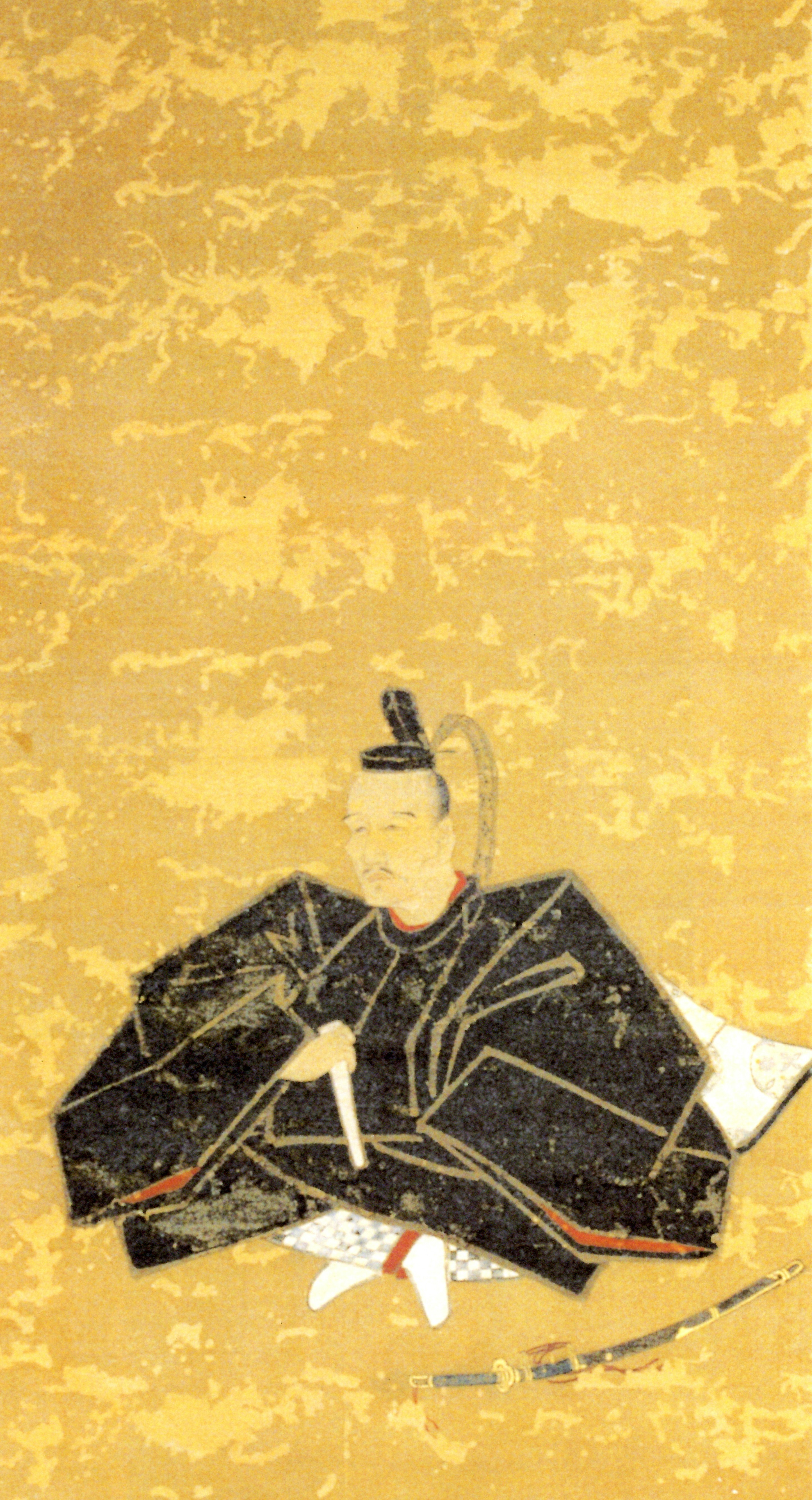 秋元泰朝の肖像。